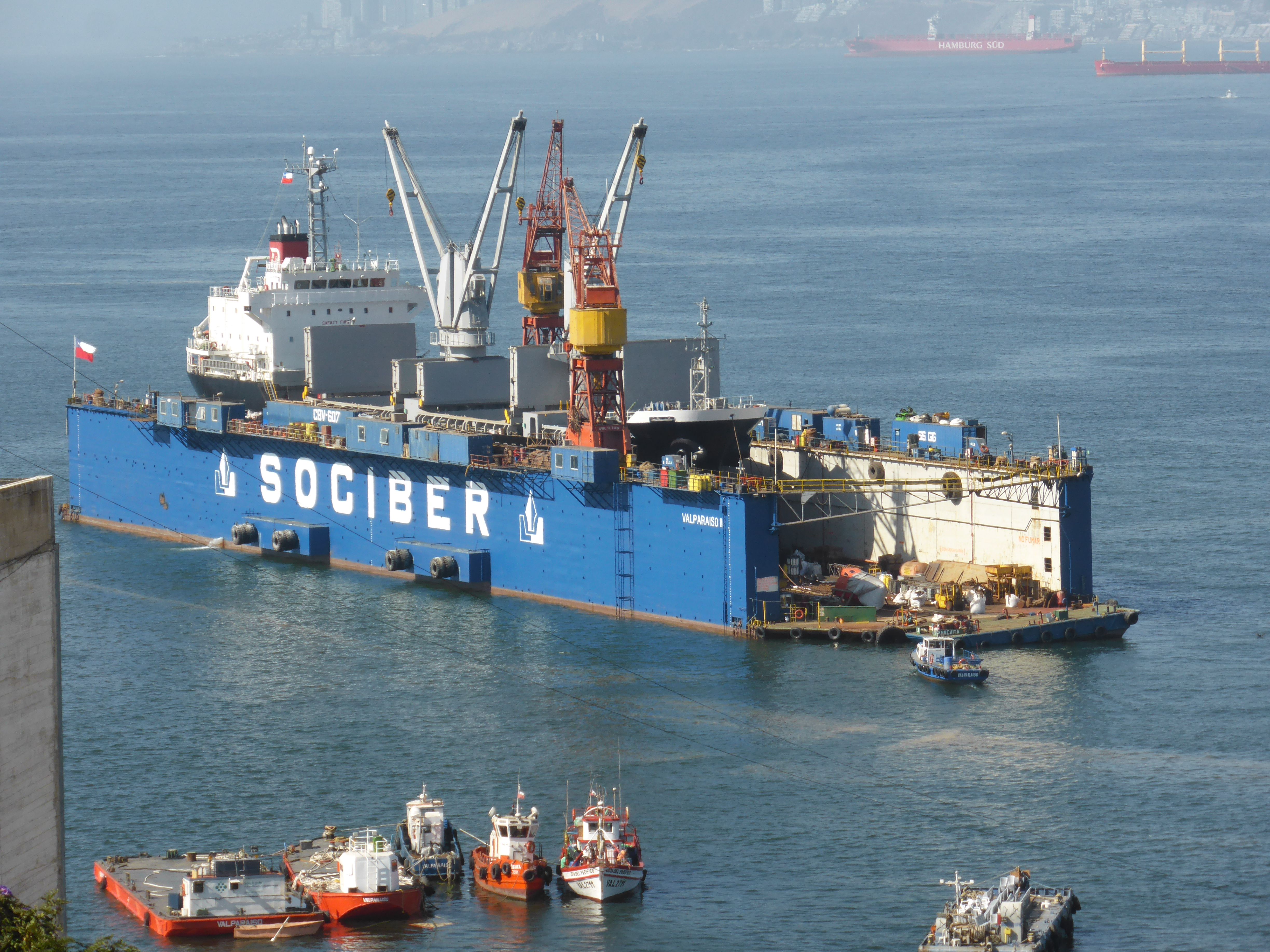 La empresa SOCIBER (Sociedad Iberoamericana de Reparaciones Navales Ltda.), dispone del dique flotante "Valparaíso III", desde el año 1985, construido en los astilleros de Asmar en Talcahuano. En esta foto, está en reparación el carguero "Balsa 86", con matrícula de Panamá, IMO 9580273, construido en 2011. La vista está tomada desde el cerro Concepción, cerca del cerro Alegre, de "Valpo" (Valparaíso).